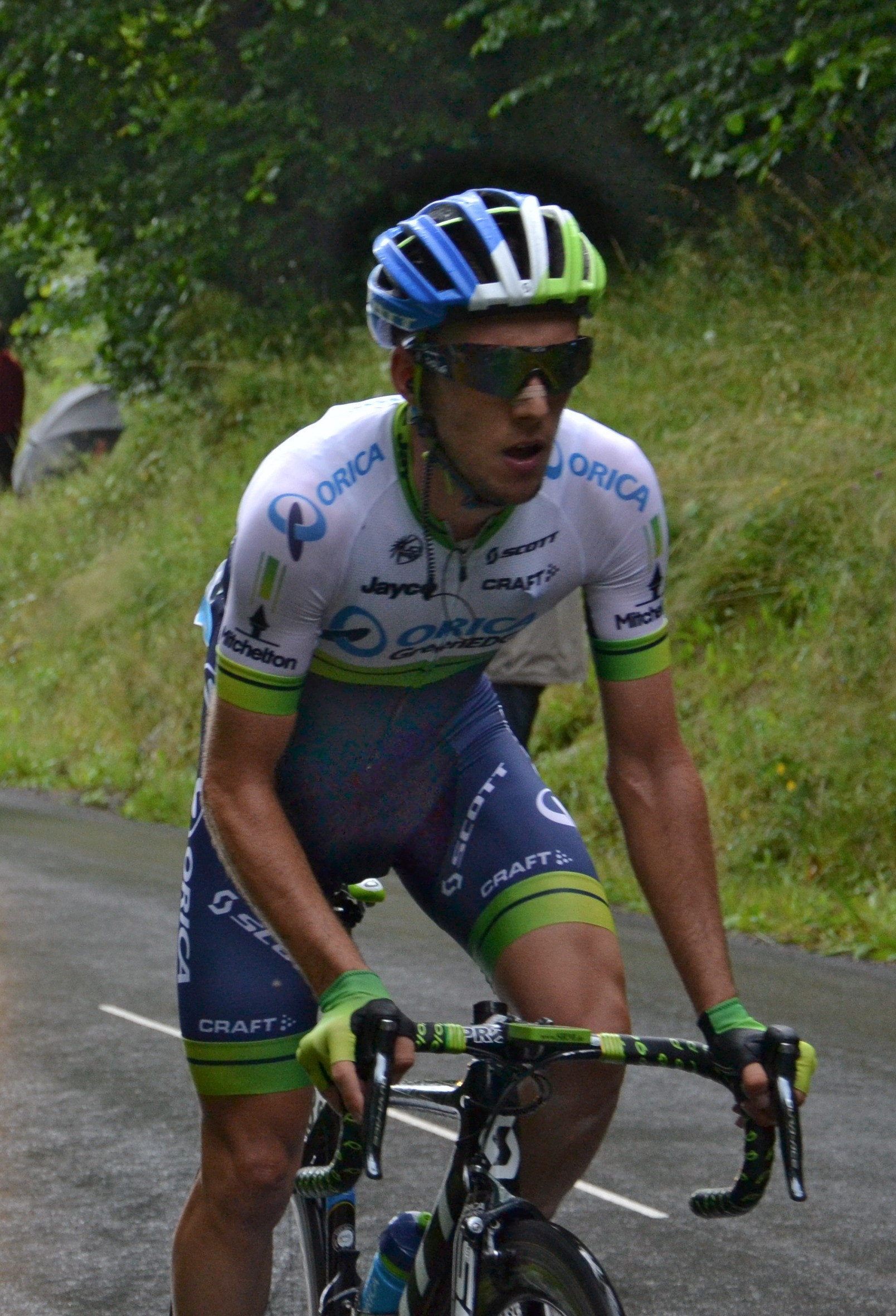 Simon Yates dans la montée du col de la Croix des Moinats.